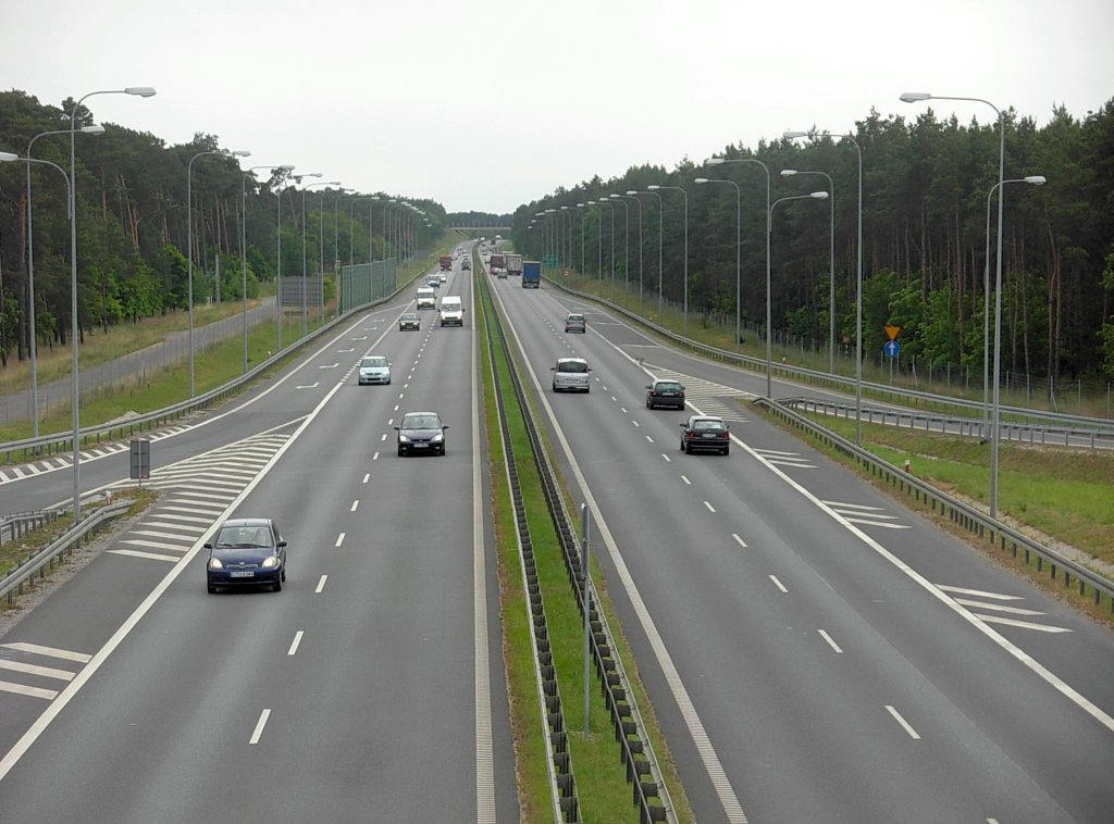 Droga ekspresowa S5, wyjazd z Bydgoszczy na południe - widok z węzła "Lotnisko"